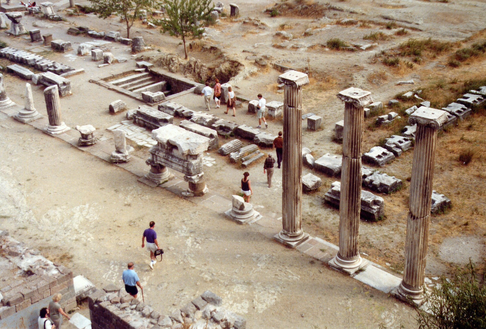 Pergamon, Westtürkei, Asklepieion, Hof